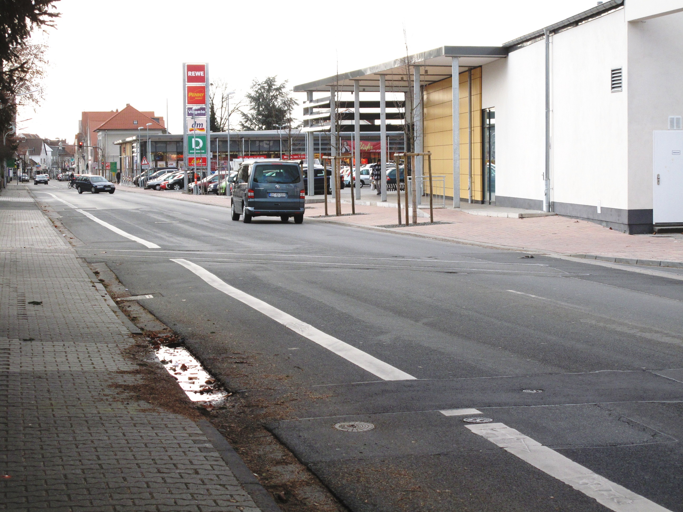 Ehemaliger Gleisanschluss der Brauerei am Bahnhof Pfungstadt